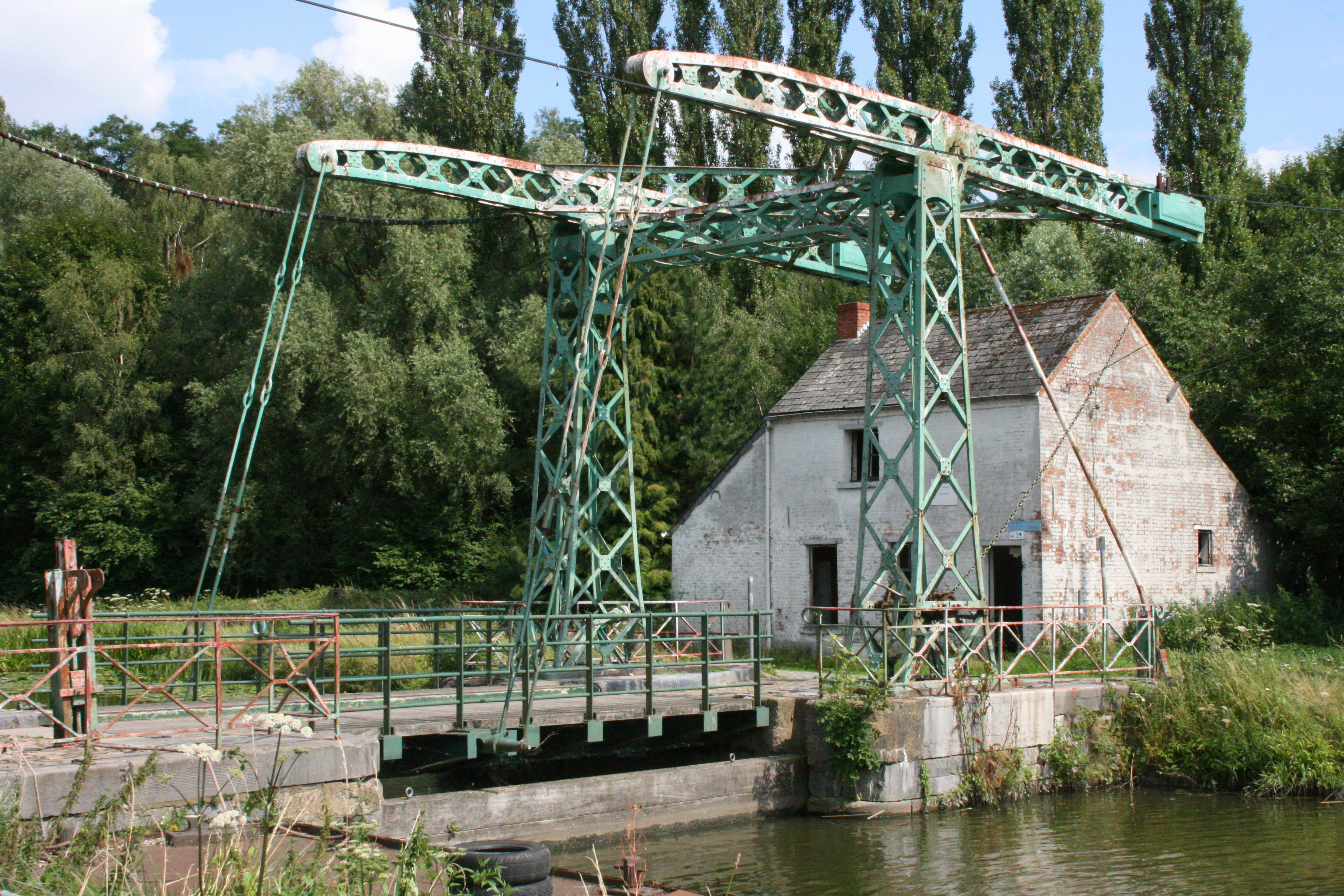 Pont de l'Origine. Ainsi appelé car il était à l'origine du Canal du Centre. Type pont-levis. Commune de Seneffe (province du Hainaut), Belgique